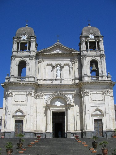 Chiesa Madre "S. Maria della Provvidenza" (sec. XVIII) - Foto D. Pennisi